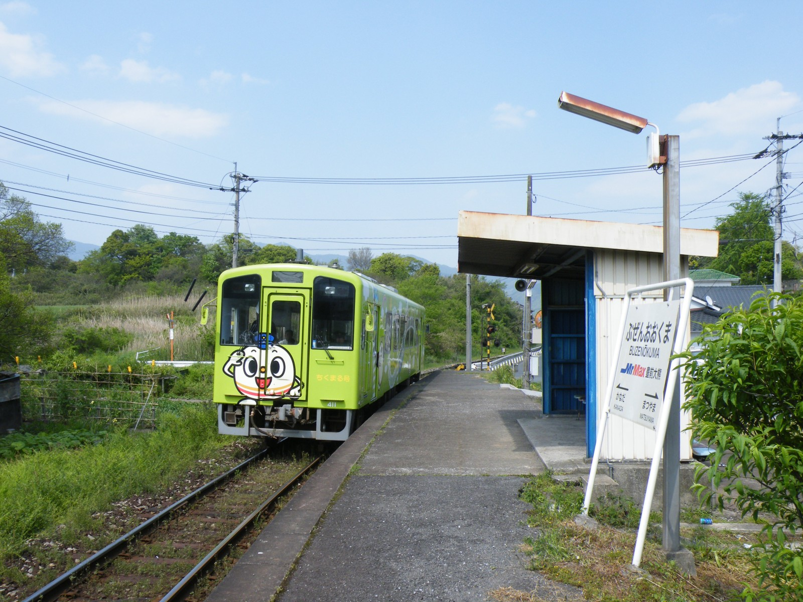 平成筑豊鉄道糸田線豊前大熊駅ホーム